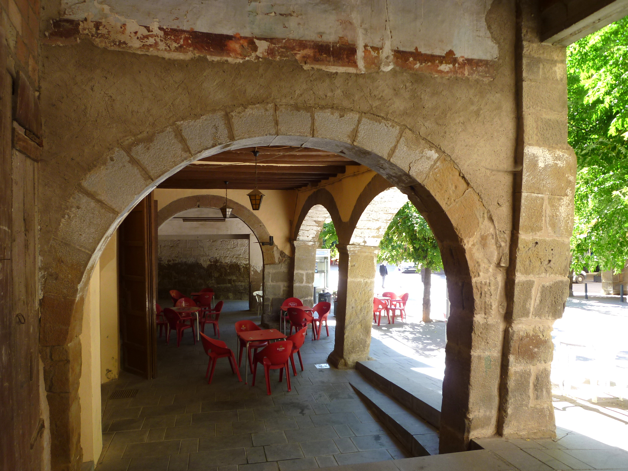 Ca l'Enric (Sanaüja): porxos sota casa